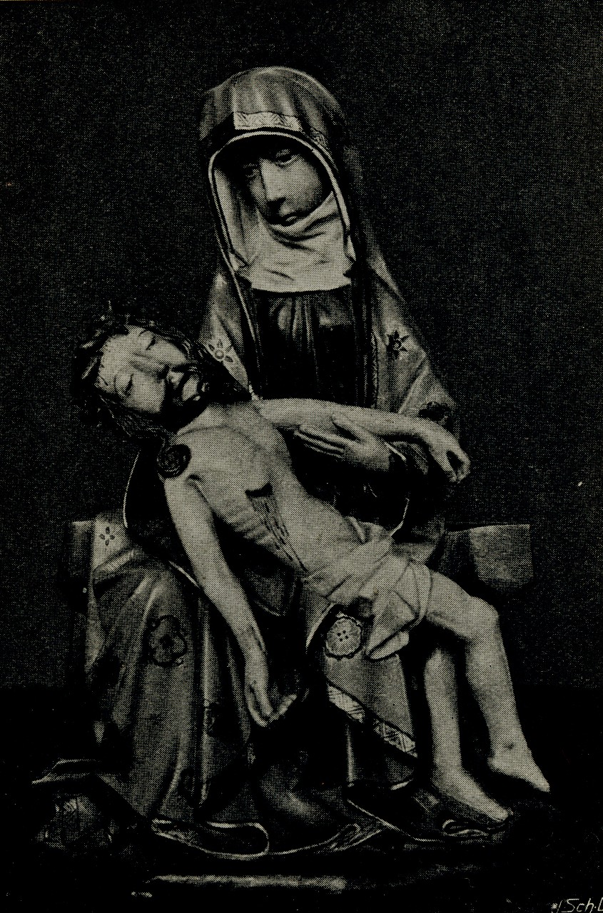 Pietà (14. Jh.) in der Nikolauskirche, Aachen